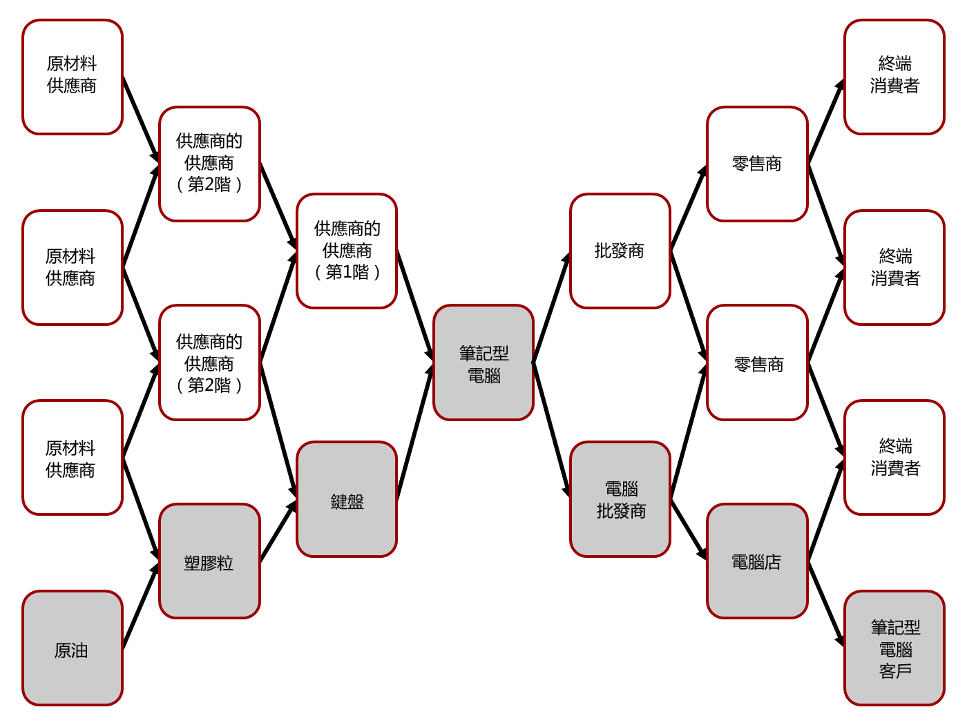 供應與需求網路